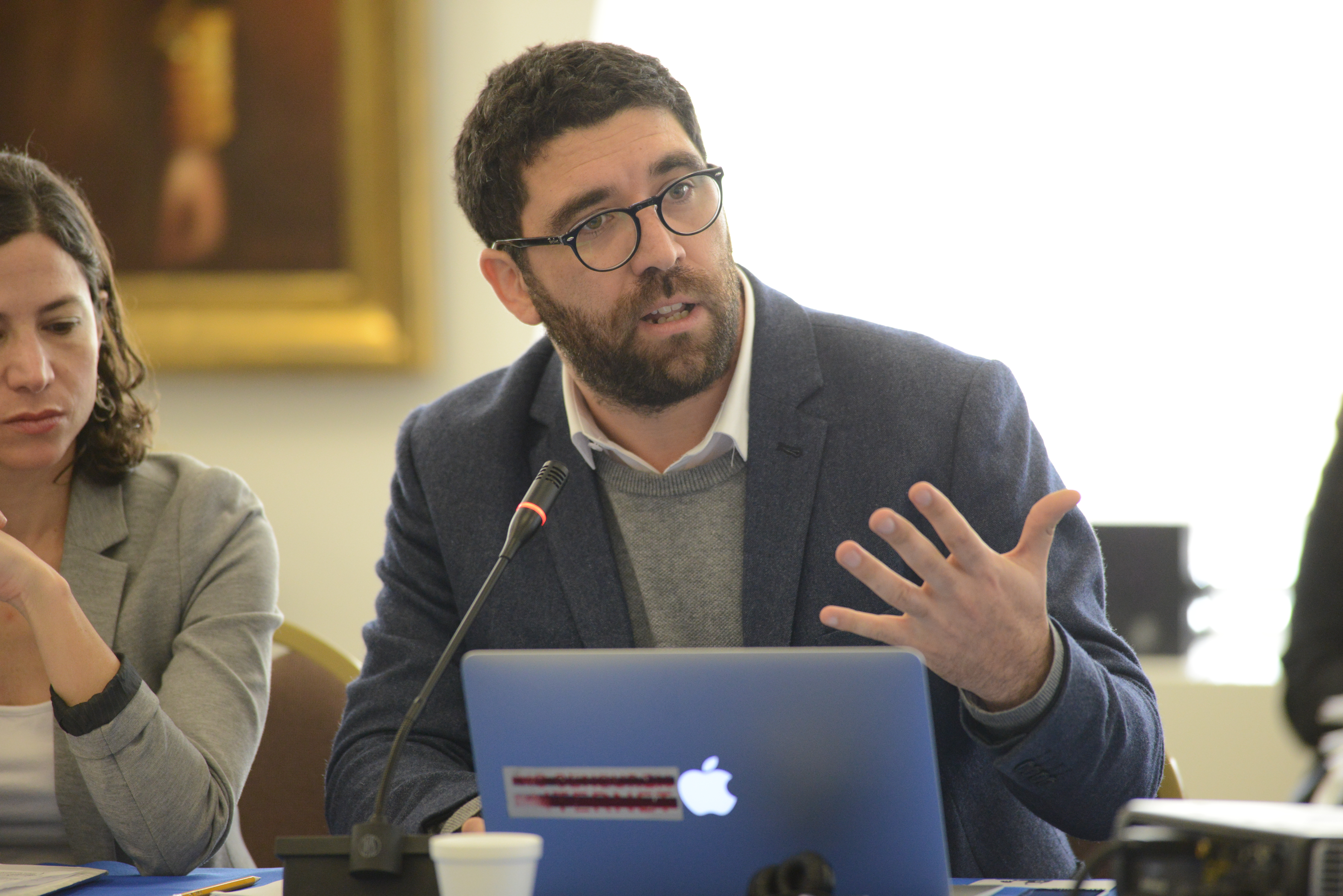 153 Período Ordinario de Sesiones de la CIDH 28 de octubre de 2014 Peticionario: Claudio Ruiz Gallardo (Derechos Digitales, Chile) Crédito de la foto: Daniel Cima